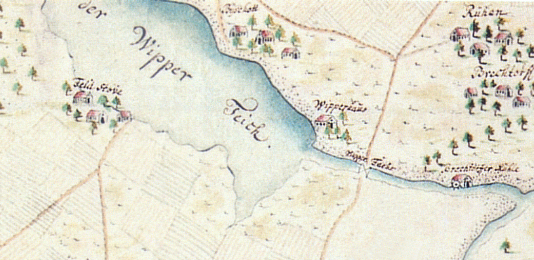 Wipperteich